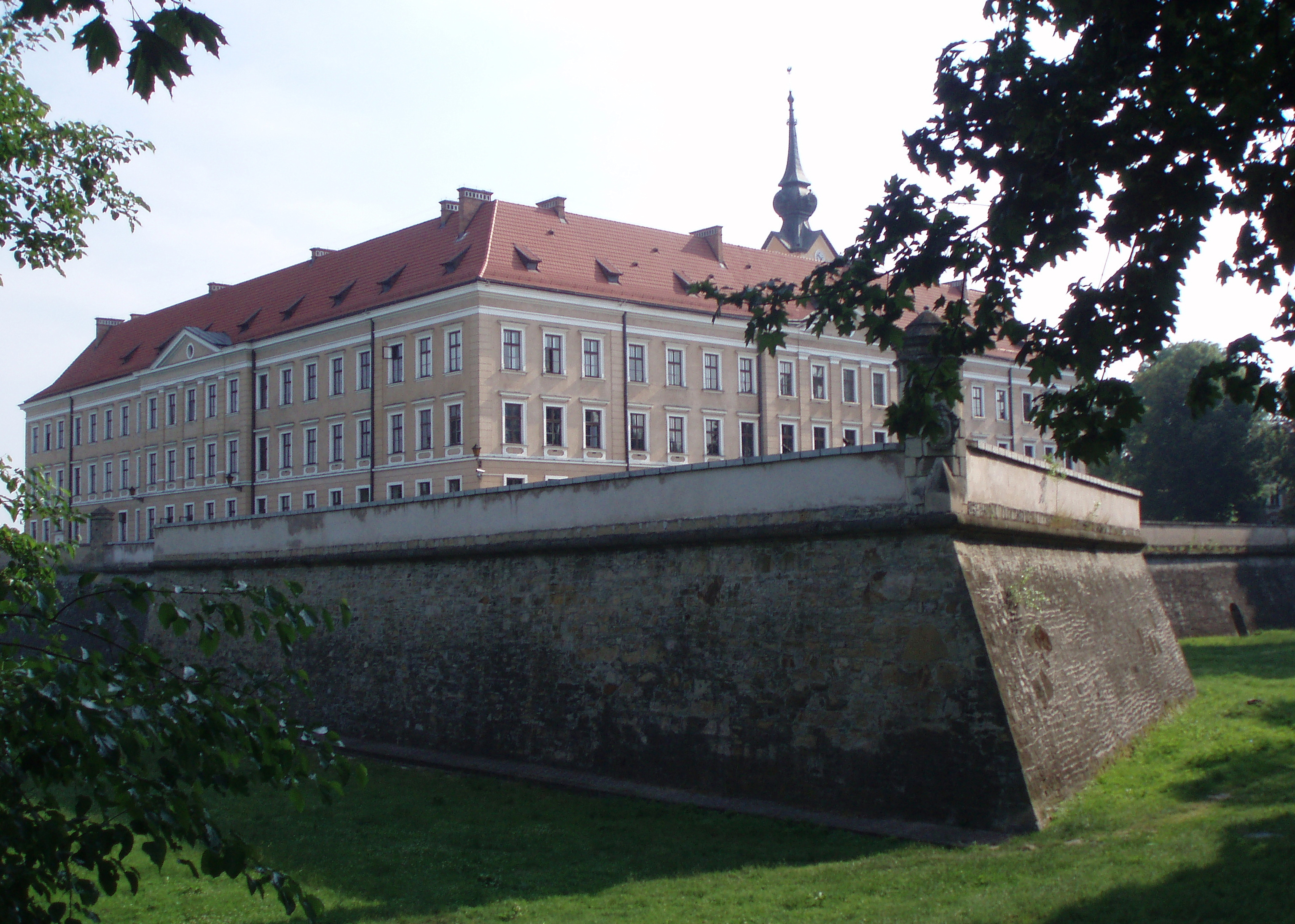 Rzeszów